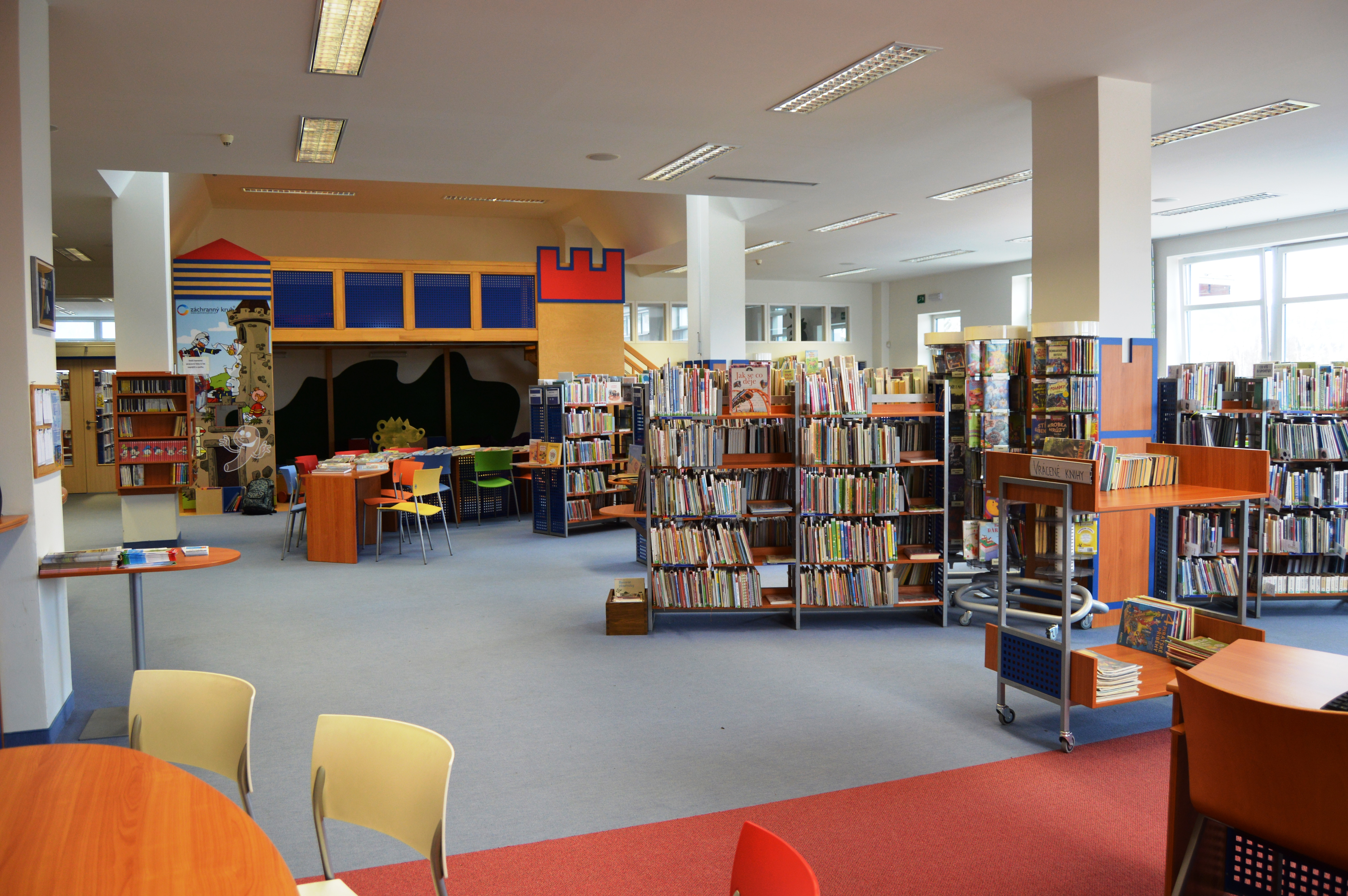 Oddělení pro děti KKKV. Pohled na řazení fondu a odpočinkovou zónu Hrad.